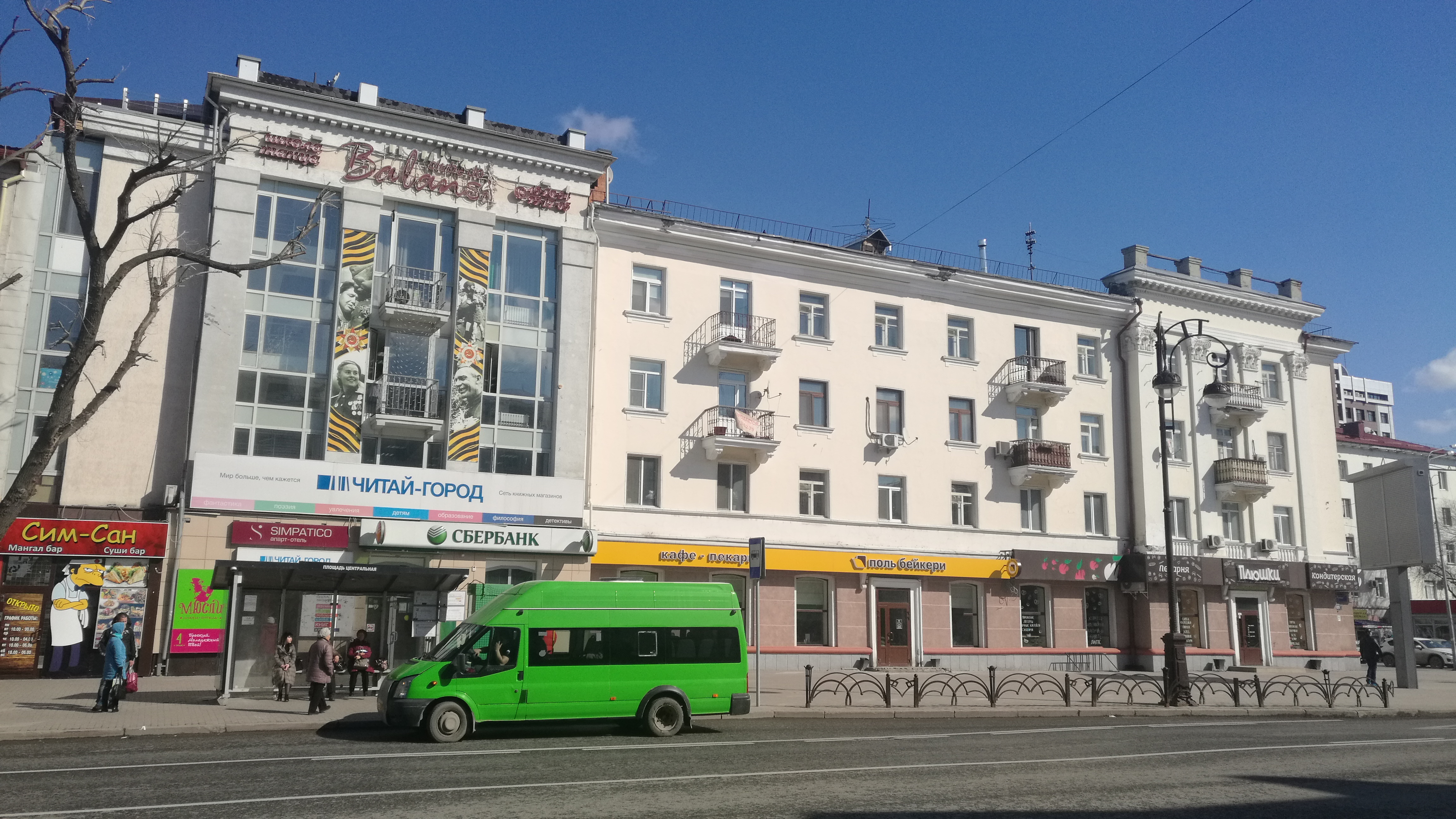 Domo N 49 en strato Respubliko. Tjumeno, Rusio.